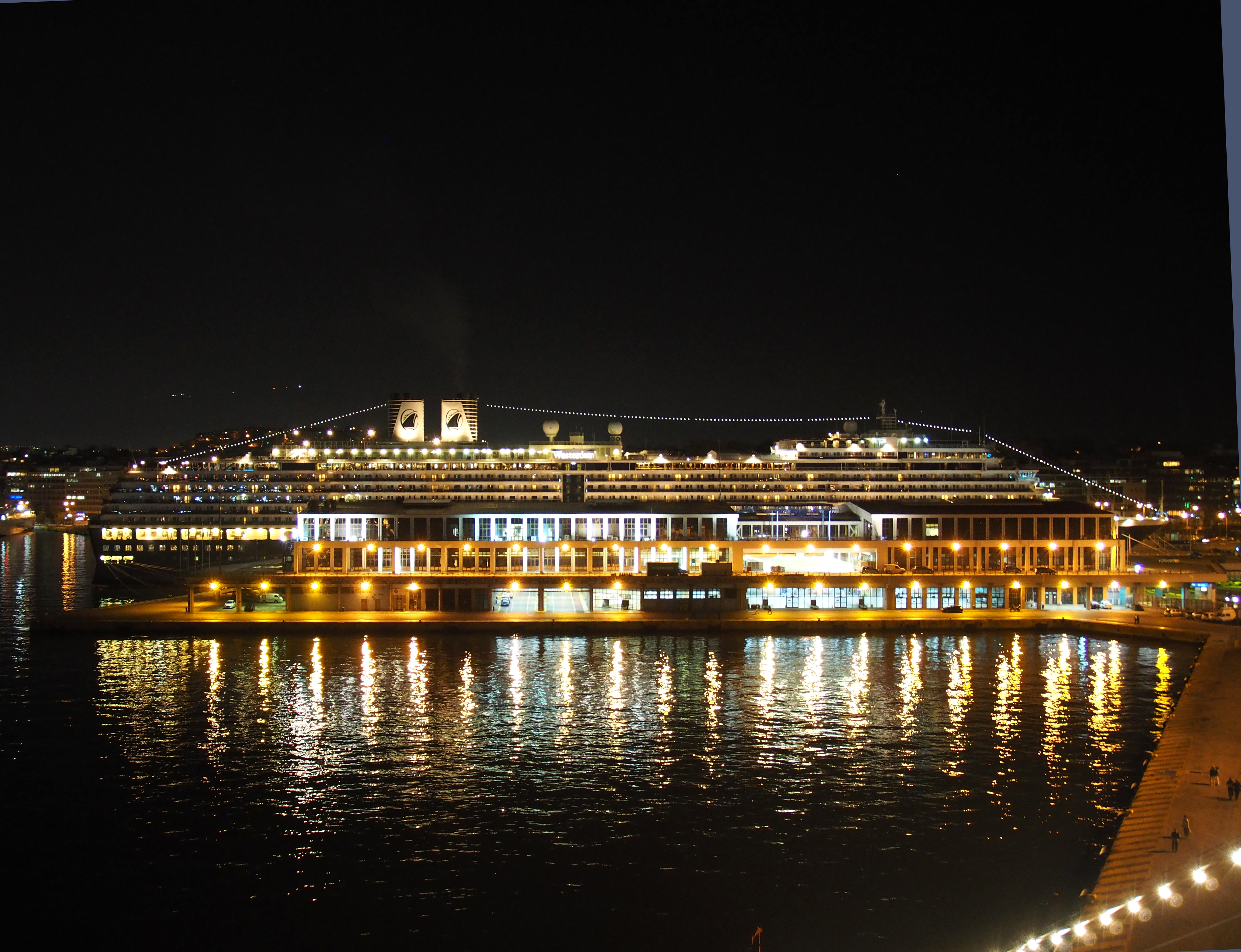 MS Westerdam am Terminal im Hafen von Piräus